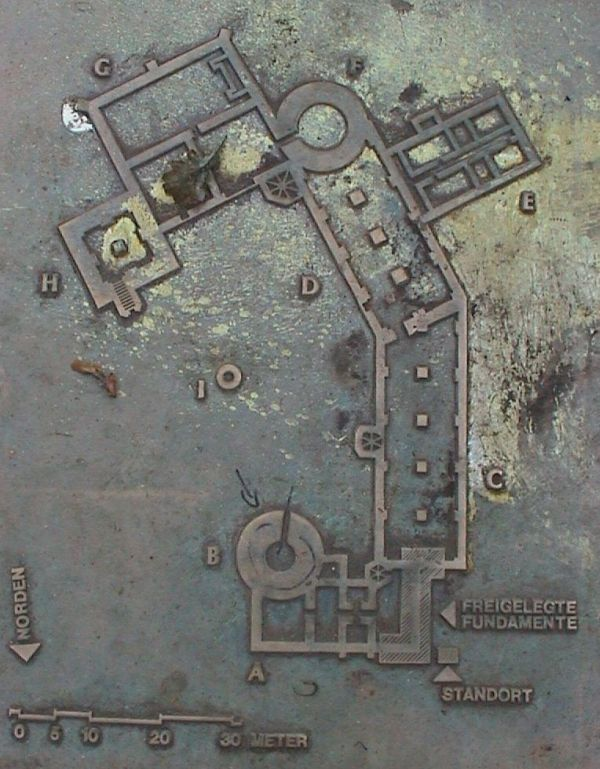 Die Grundriss der Burg Delmenhorst. Aufgenommen auf der Burginsel Delmenhorst.